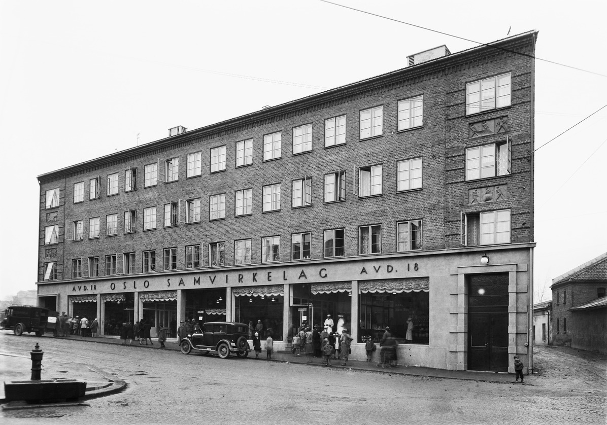 Oslo samvirkelagt avdeling 18 i Skjoldgata 2, ca. 1930. Bygningen har nå adresse Maridalsveien 169. Foto: Hans Christian Christoffersen/Oslo Museum.